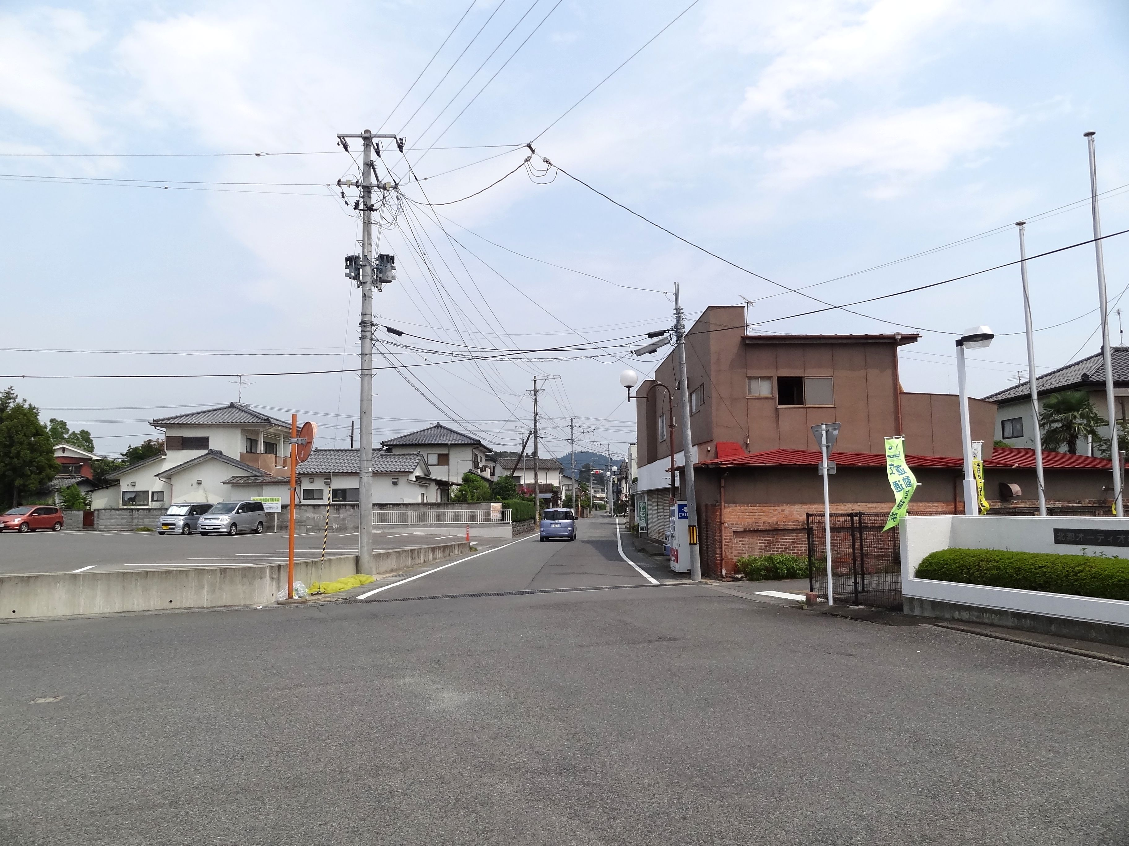 JR東日本磐越東線 赤井駅前